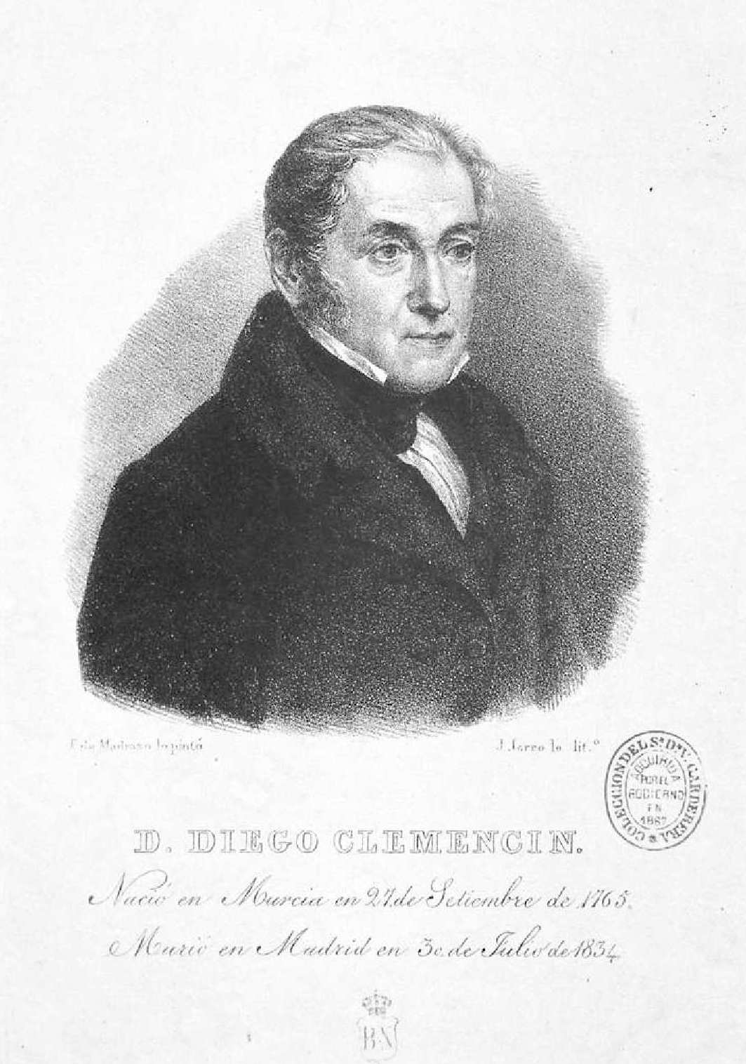 Retrato de Diego Clemencín, litografía de José Jorro por pintura de Federico de Madrazo. Biblioteca Nacional de España